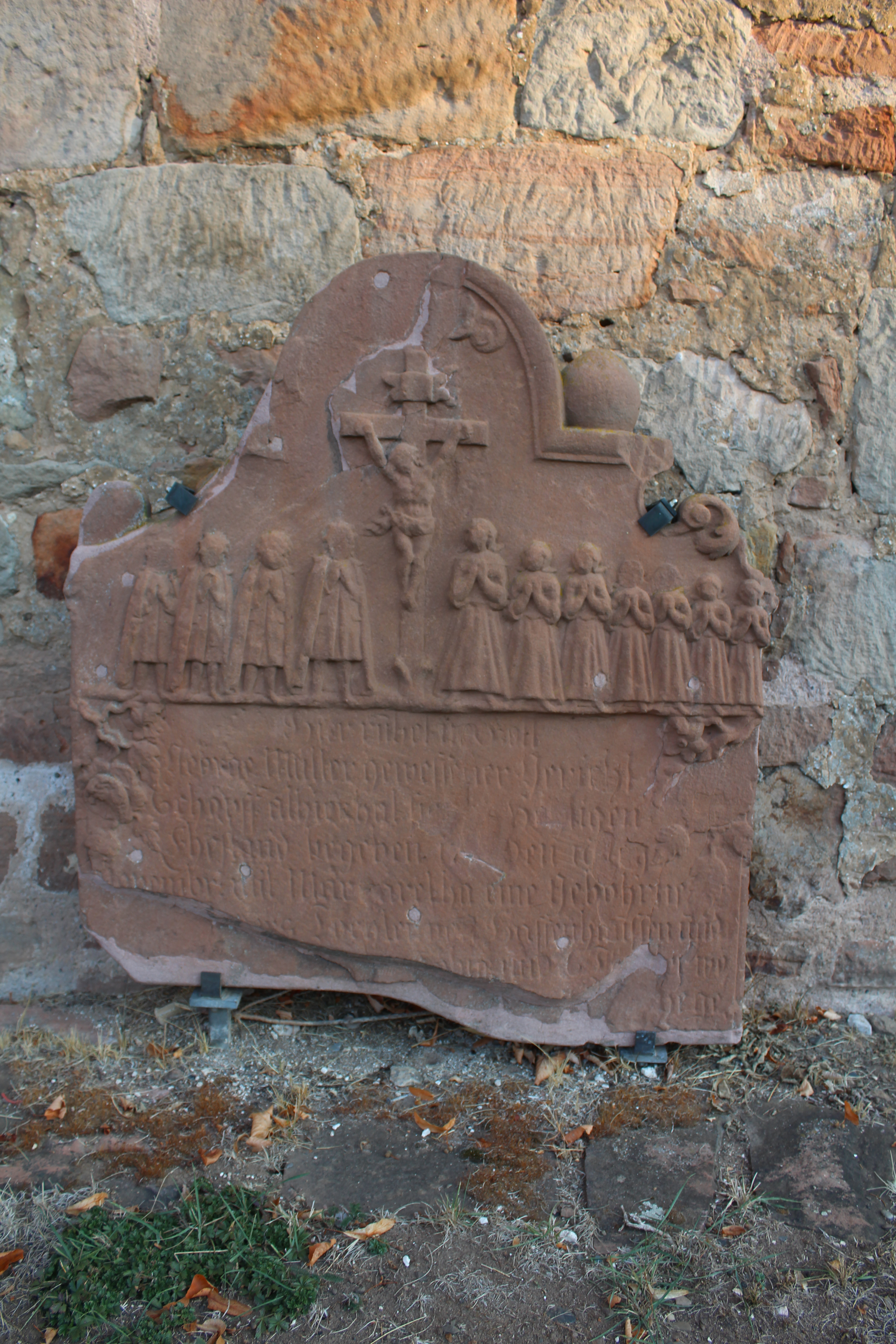 Evangelische Kirche Wolfshausen, Weimar/Lahn, Landkreis Marburg-Biedenkopf, Hessen, Deutschland